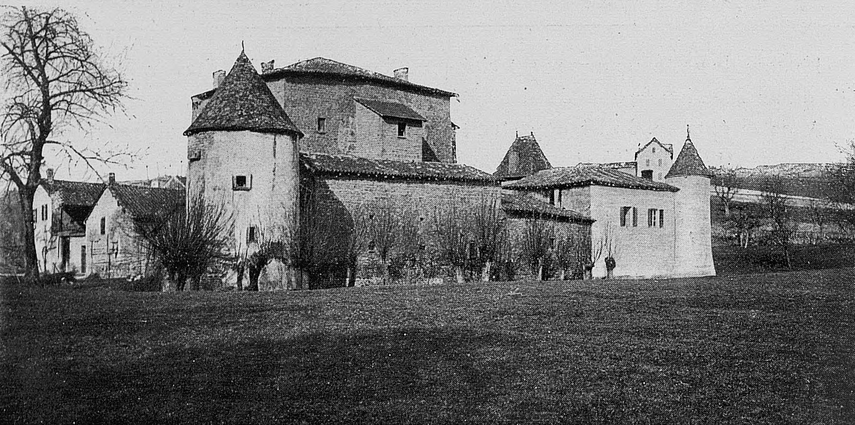 Dictionnaire illustré des communes du département du Rhône. Tome 1 / par MM. E. de Rolland et D. Clouzet.